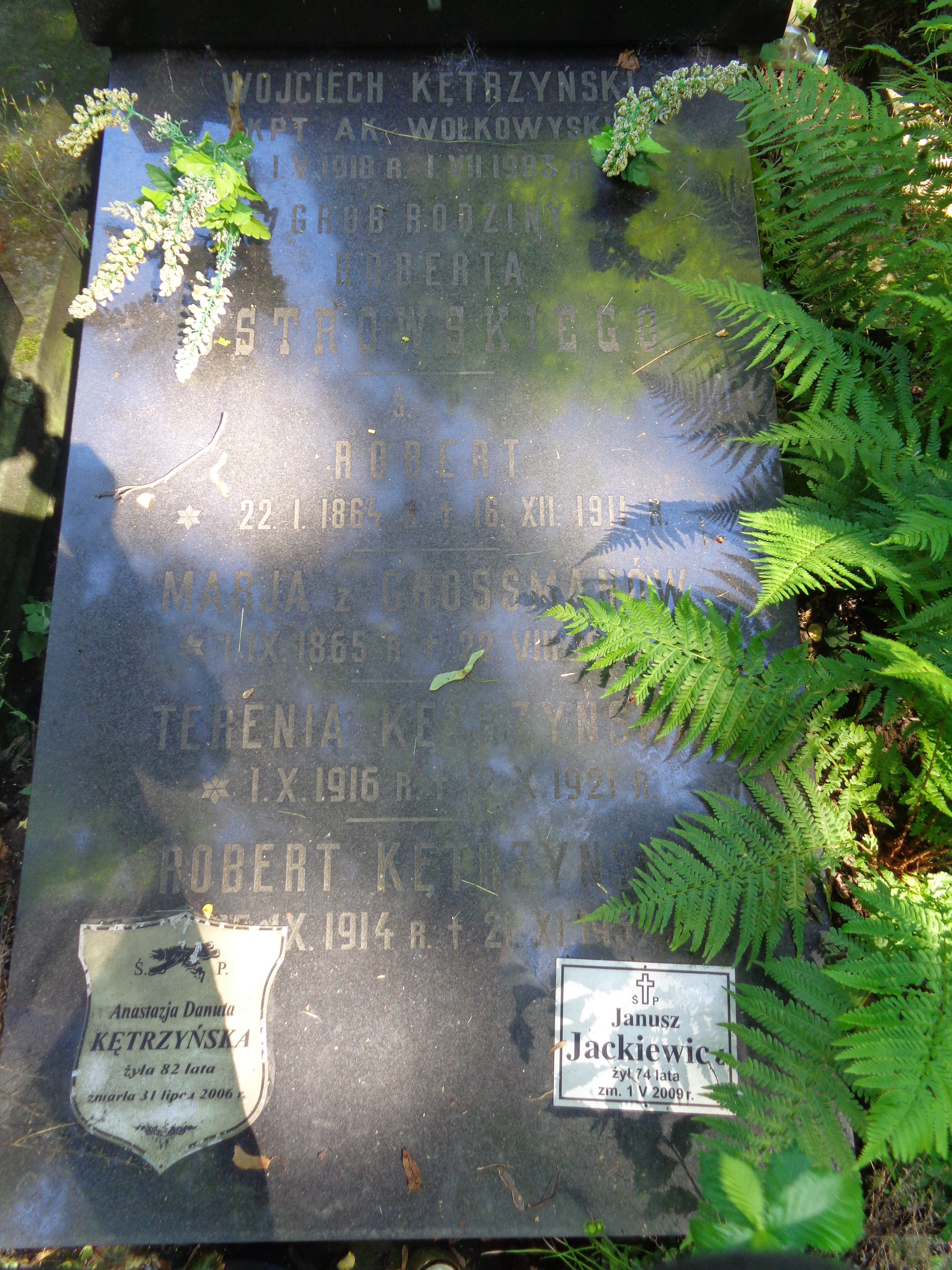 Grób Wojciecha Kętrzyńskiego na Cmentarzu Powązkowskim